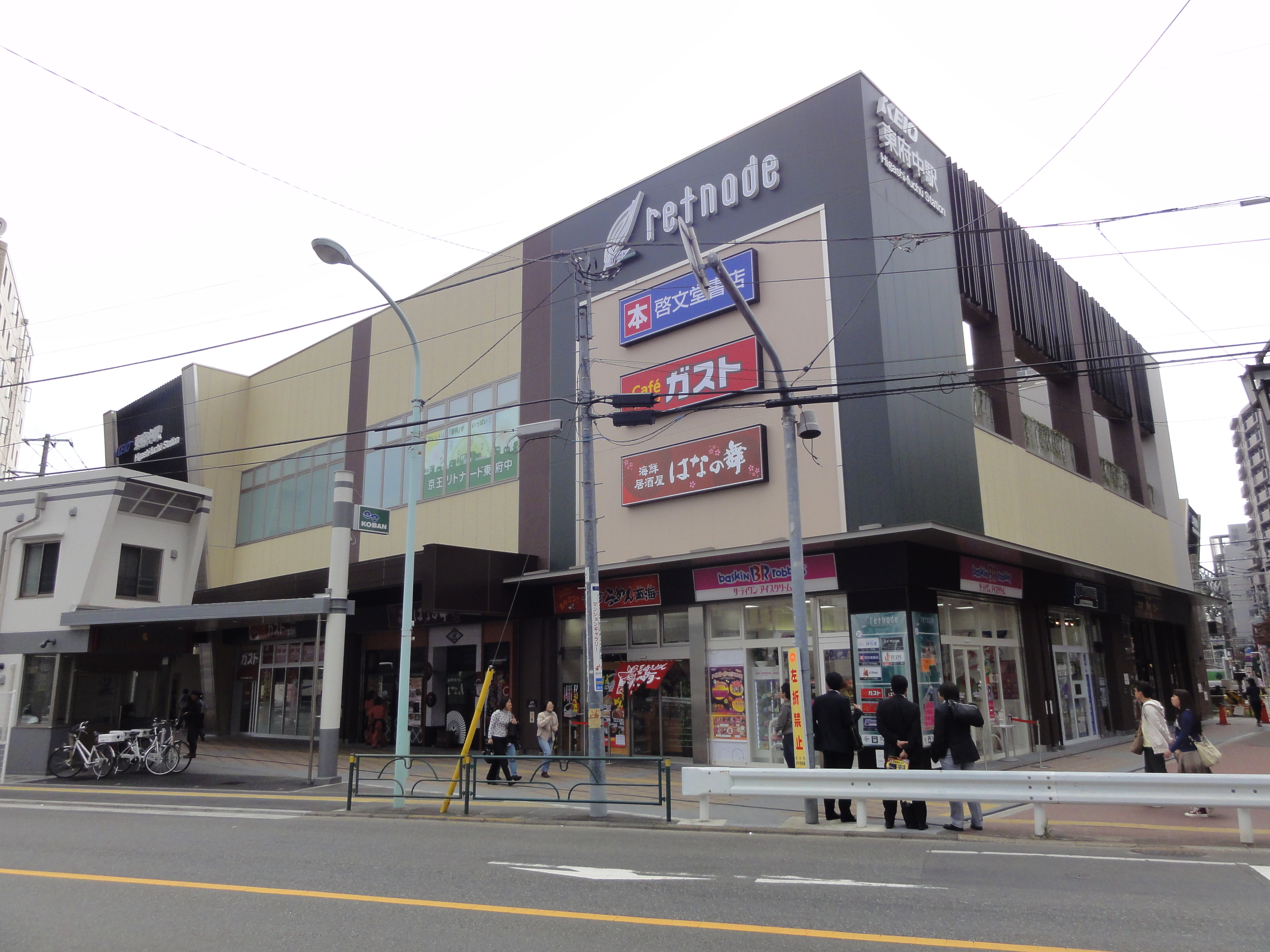 京王線東府中駅北口